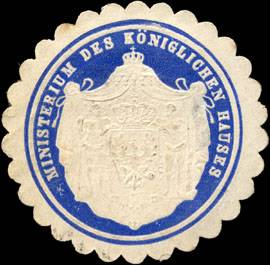 Sealing stamp Title: Ministerium des Königlichen Hauses Description: blau, weiß, geprägt Place: Berlin size: 4 cm